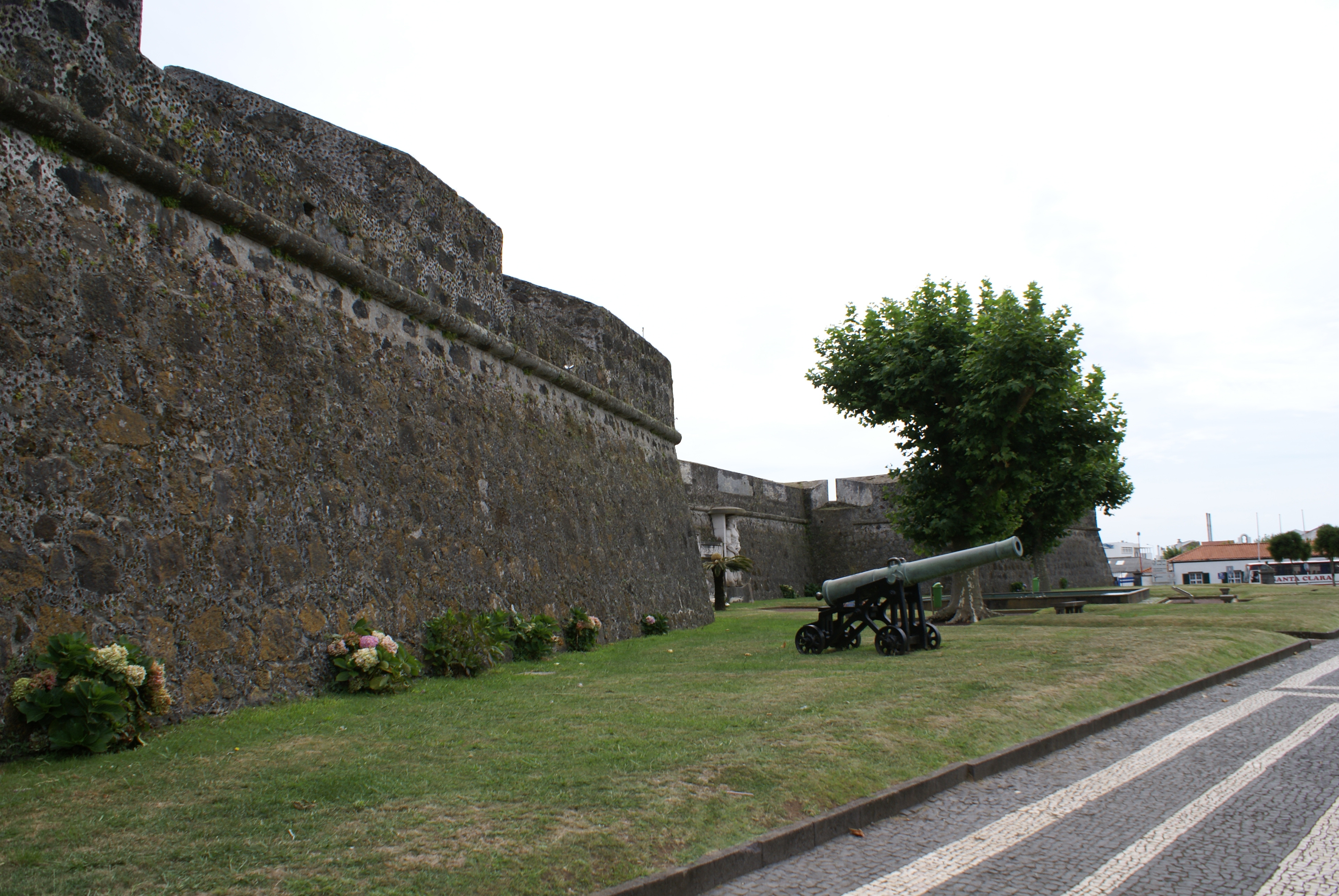 Forte de São Brás, muralha, Ponta Delgada, ilha de São Miguel, Açores